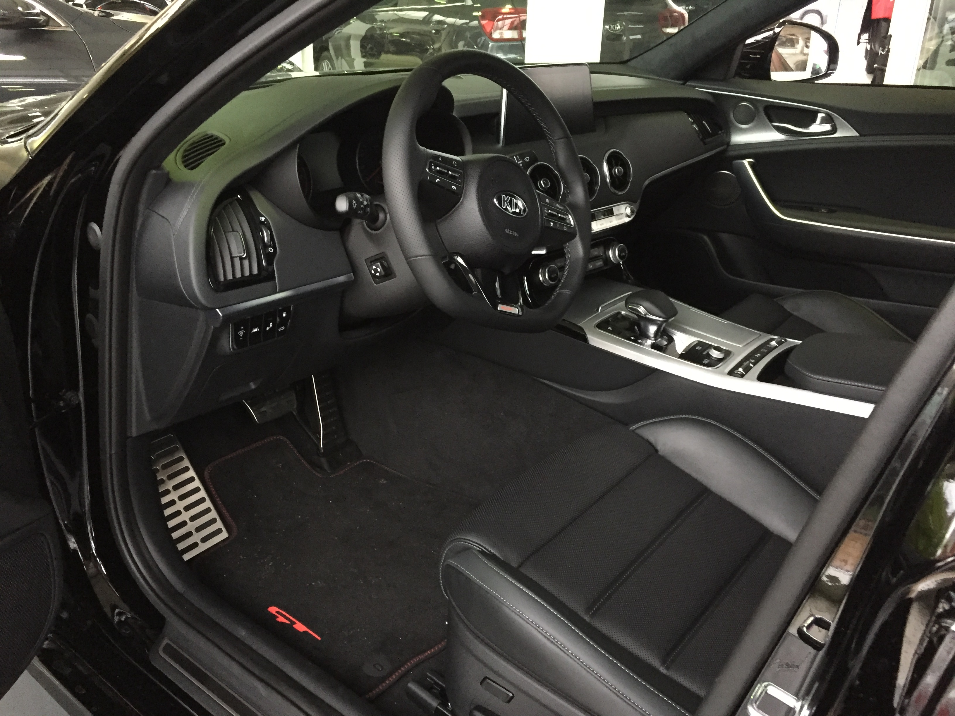 KIA Stinger GT Innenraum